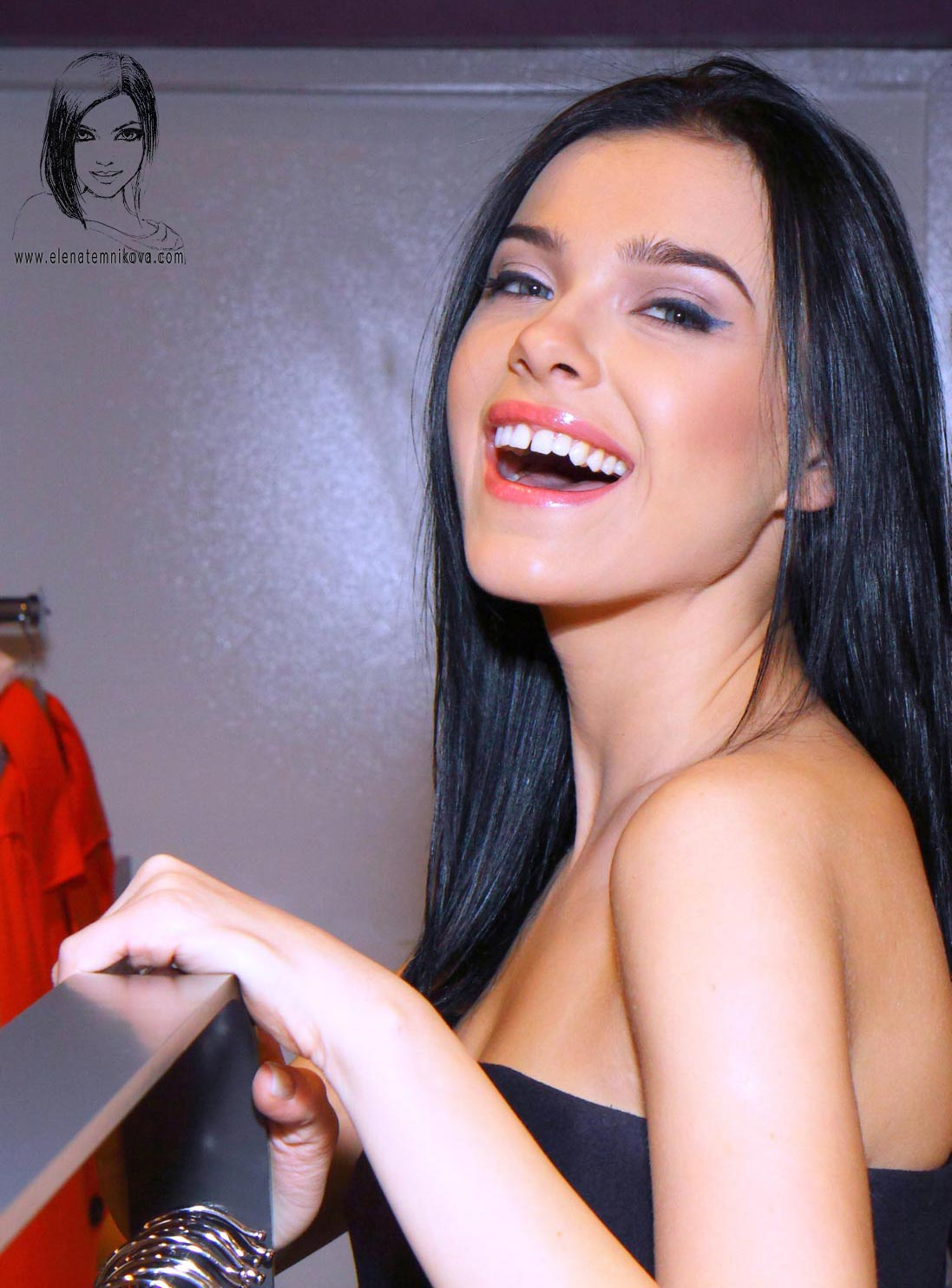 5 ноября 2009. Фотосъемка для журнала "Cosmo Shopping".